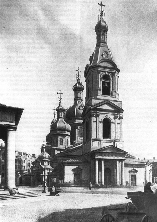 Храм Спаса на Сенной, Санкт-Петербург